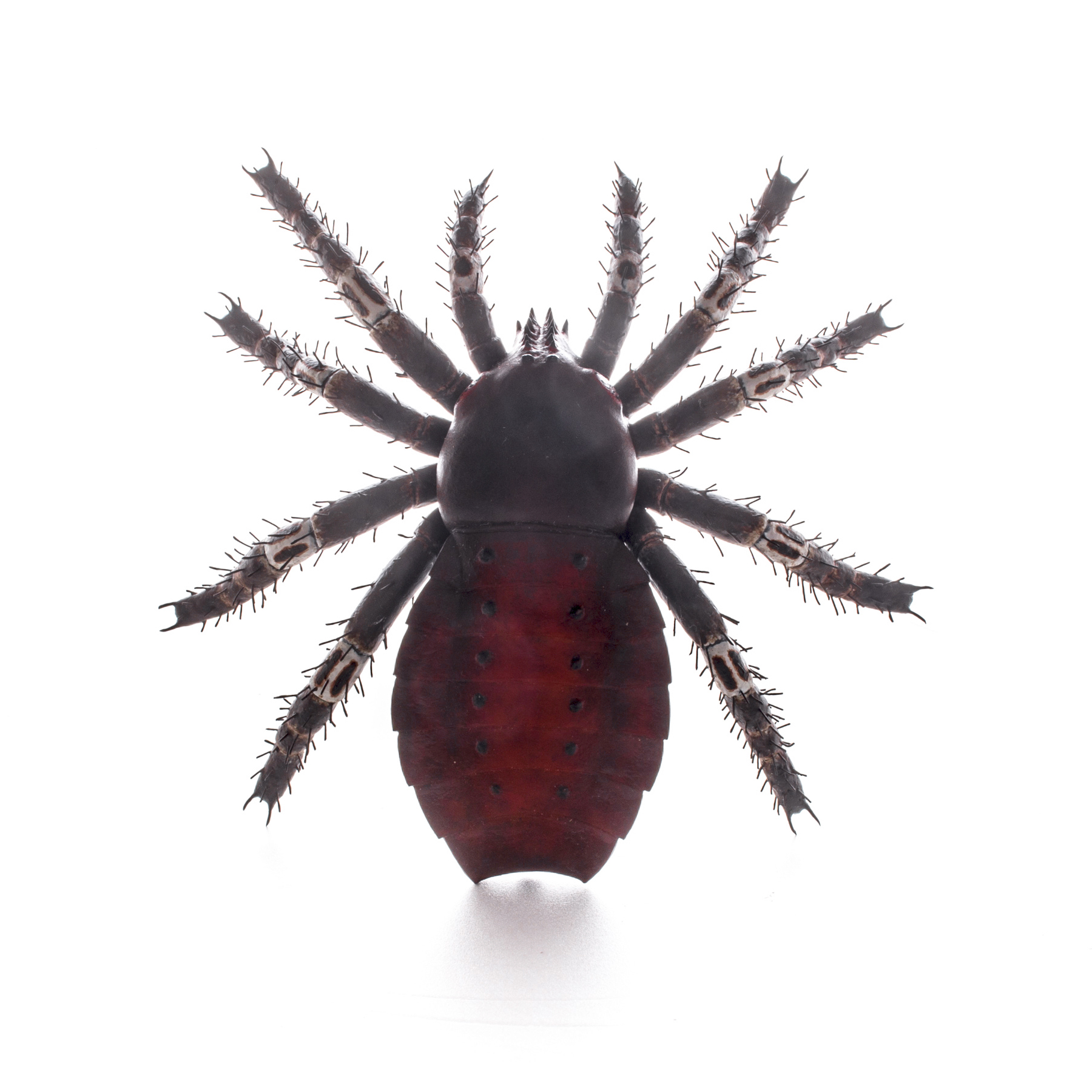 Ricostruzione in scala 40:1.